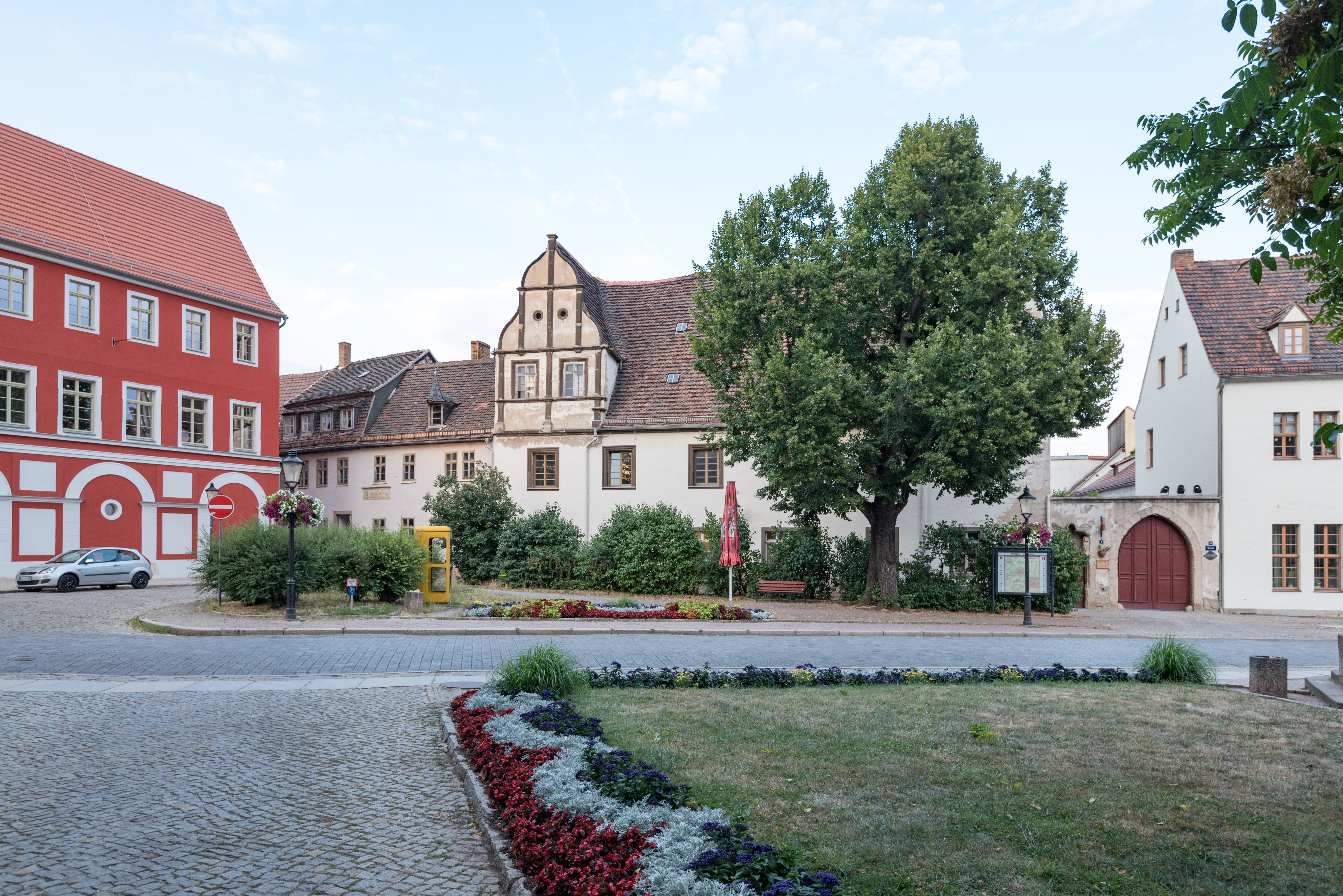 Naumburg (Saale), Domplatz 1